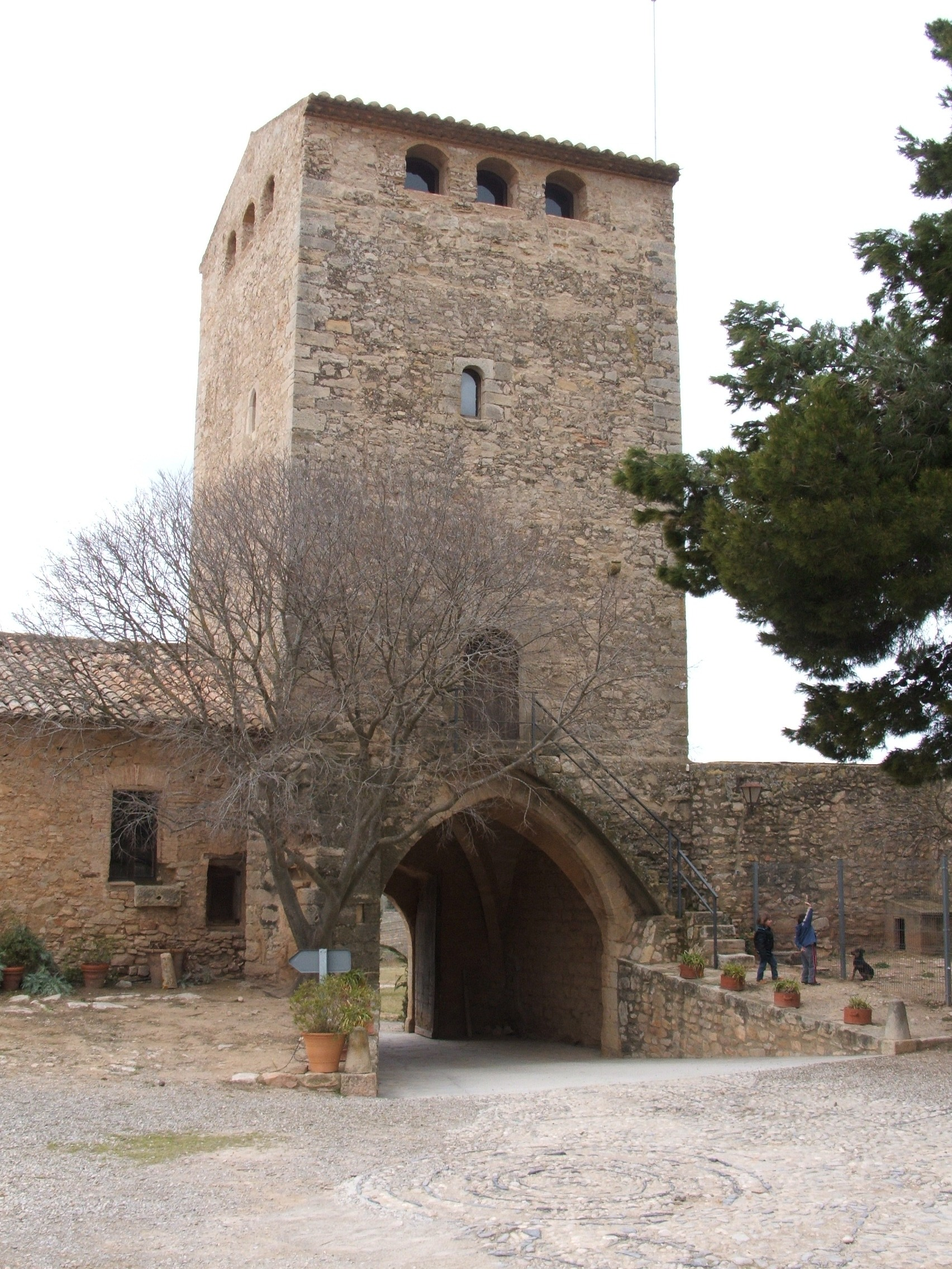 Porta Pincipal Castell Milmanda (Bodegas Torres), Vimbodí, Conca de Barberà, Tarragona